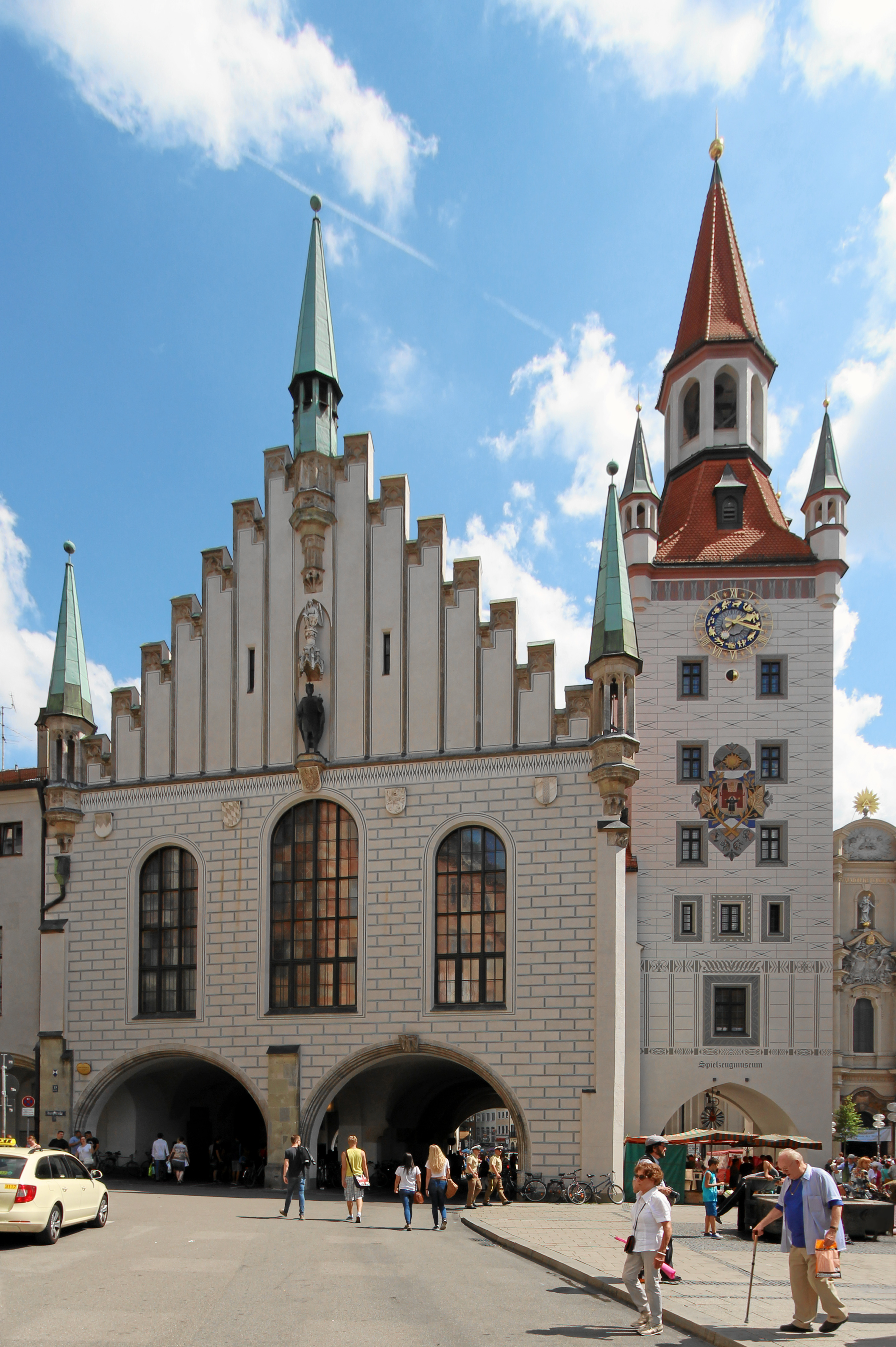 Das Alte Rathaus, 2014